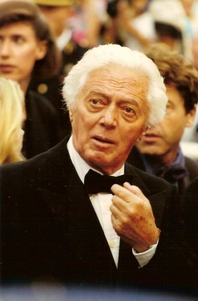 Dino Risi au festival de Cannes